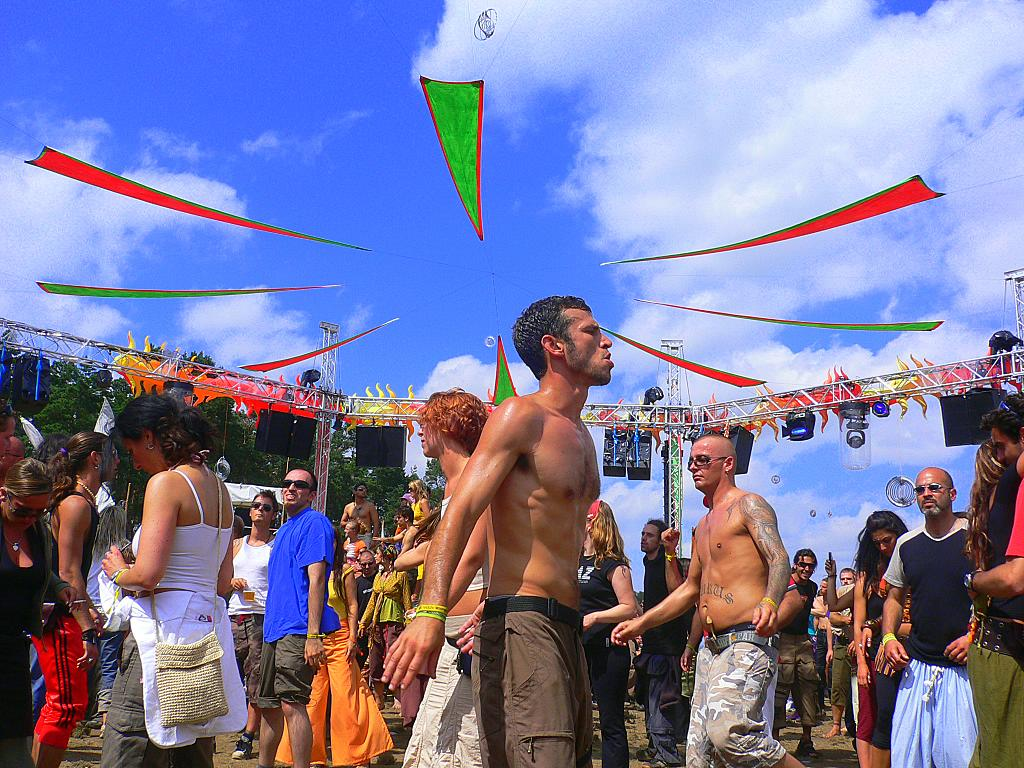 Goa Carnival